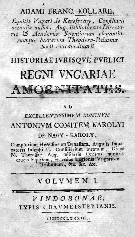 Adam F. Kollar, Historiae jurisque publici regni Ungariae